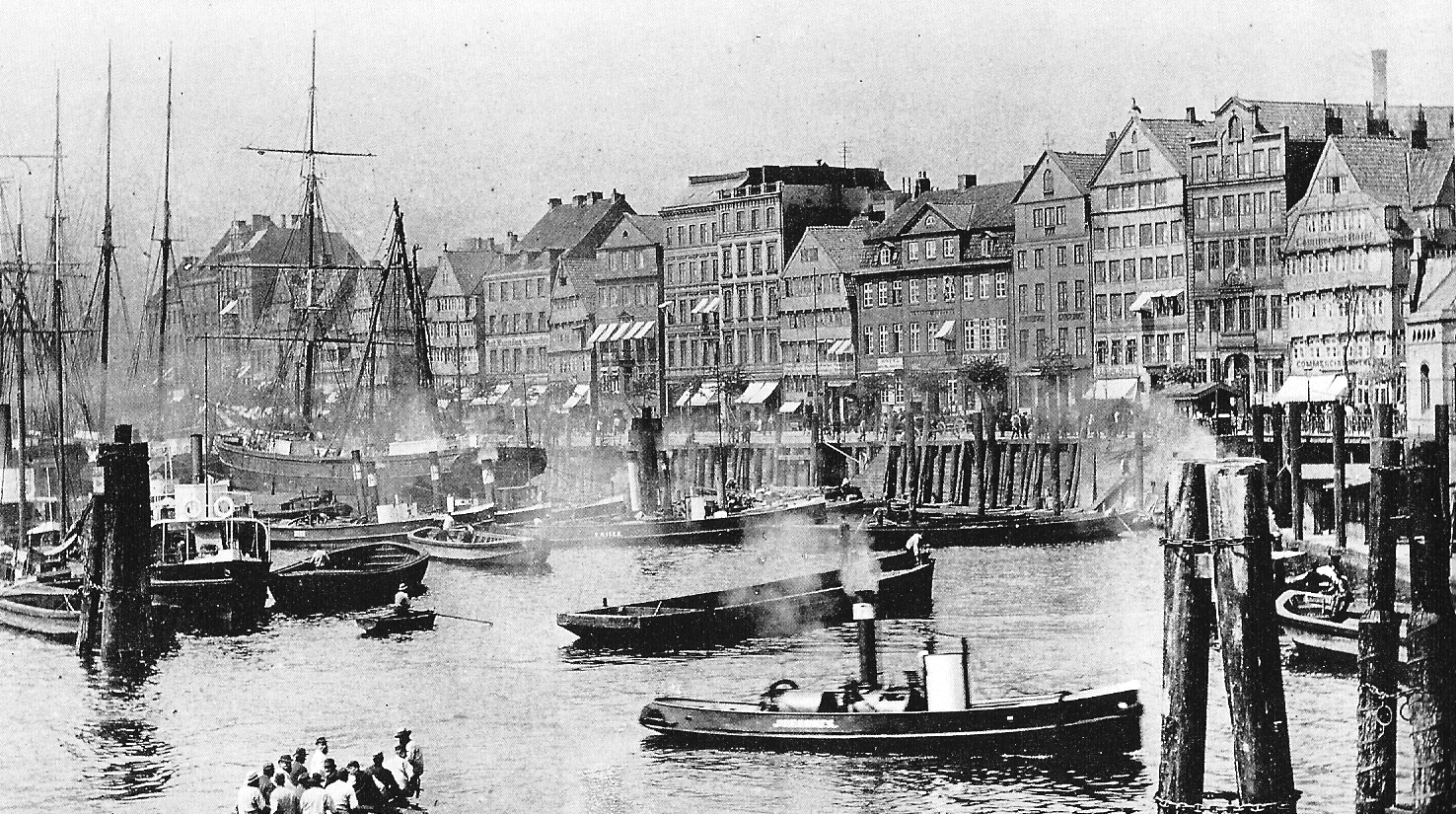 Der Niederhafen bei der Straße Vorsetzen in der Hamburger Neustadt 1888.